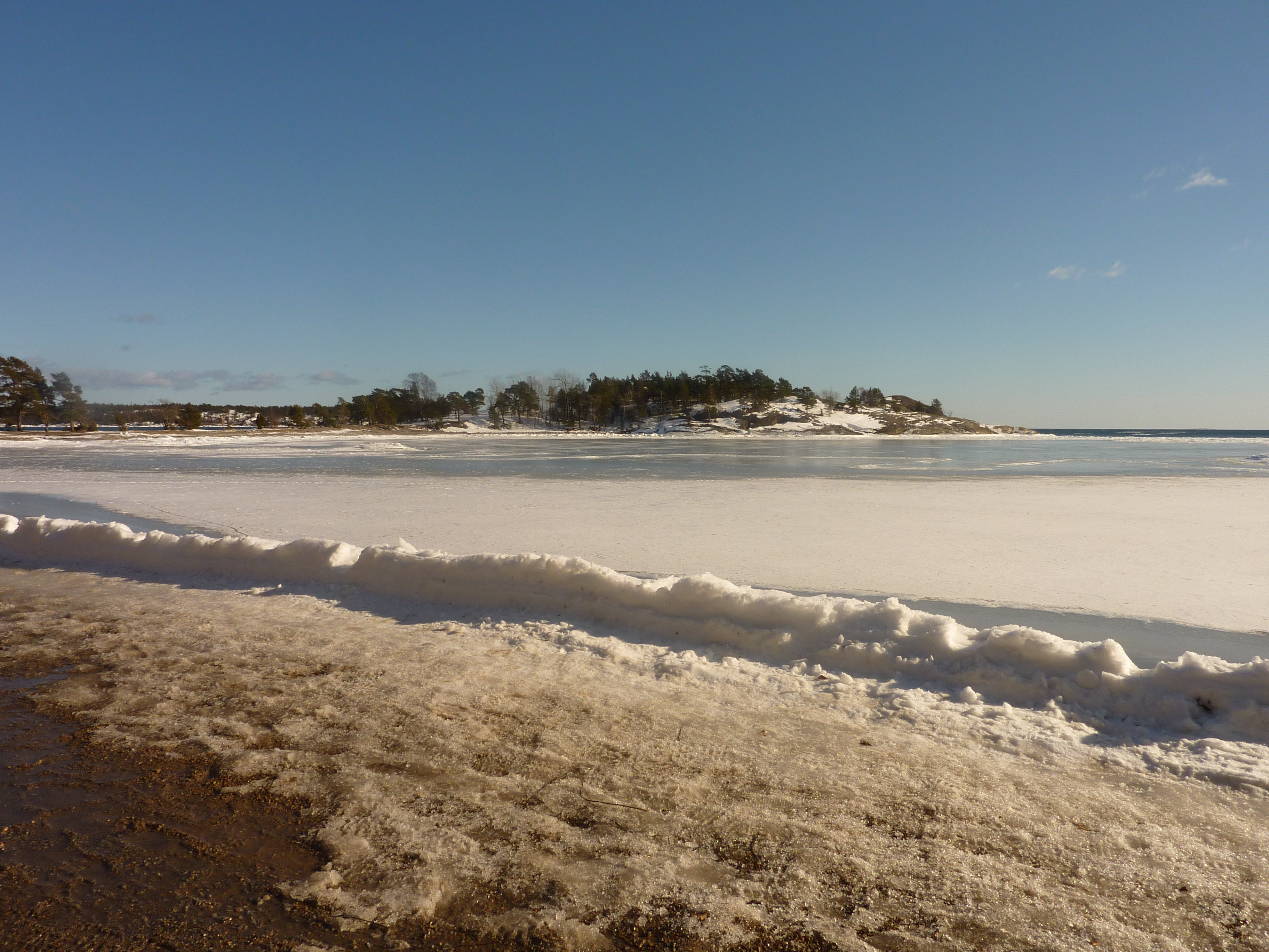 Knappelskär sett från stranden.